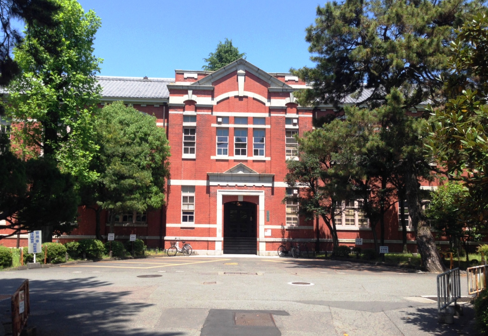 京都大学工学部土木工学教室本館